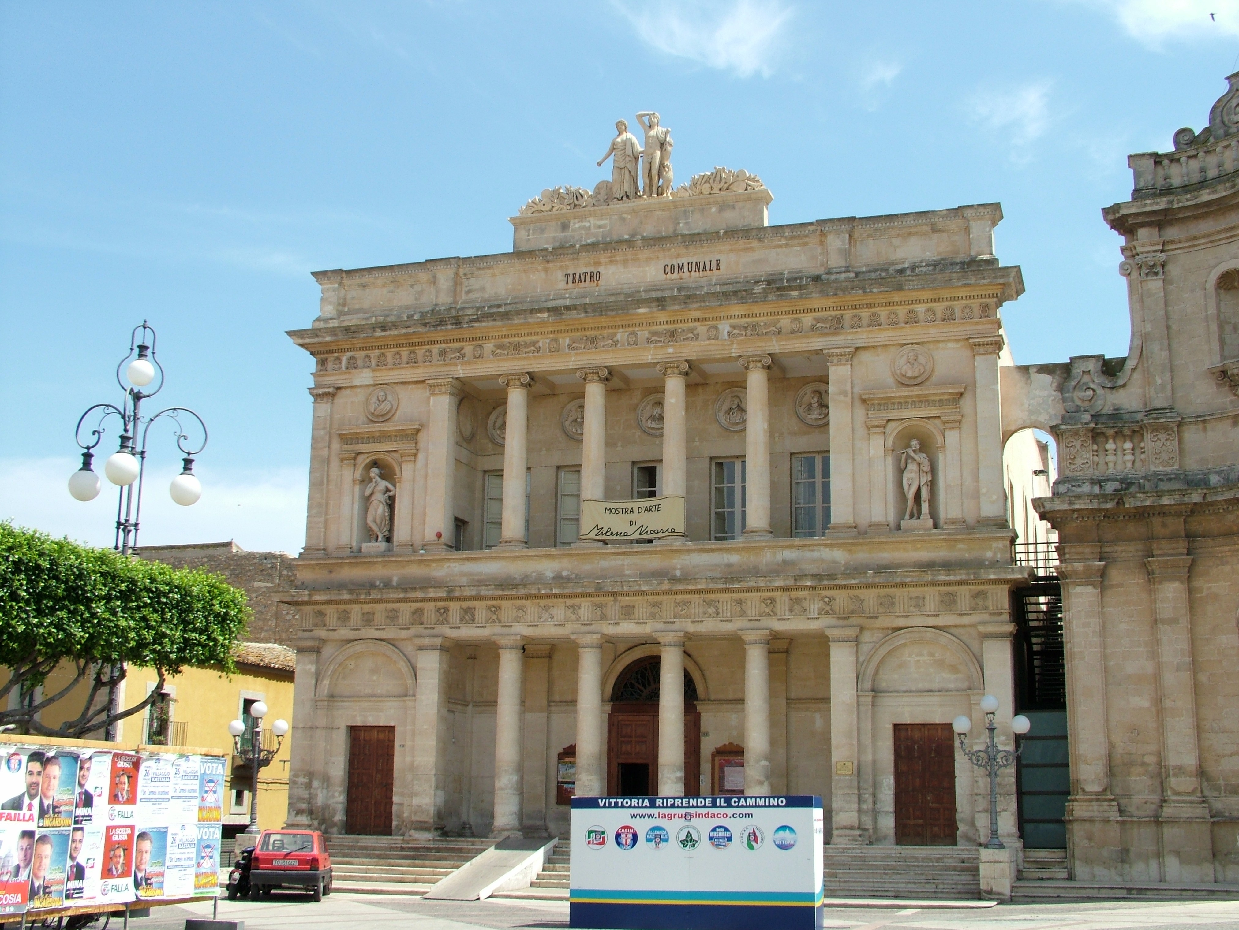 Vittoria Teatro Comunale, Sicily, Italia